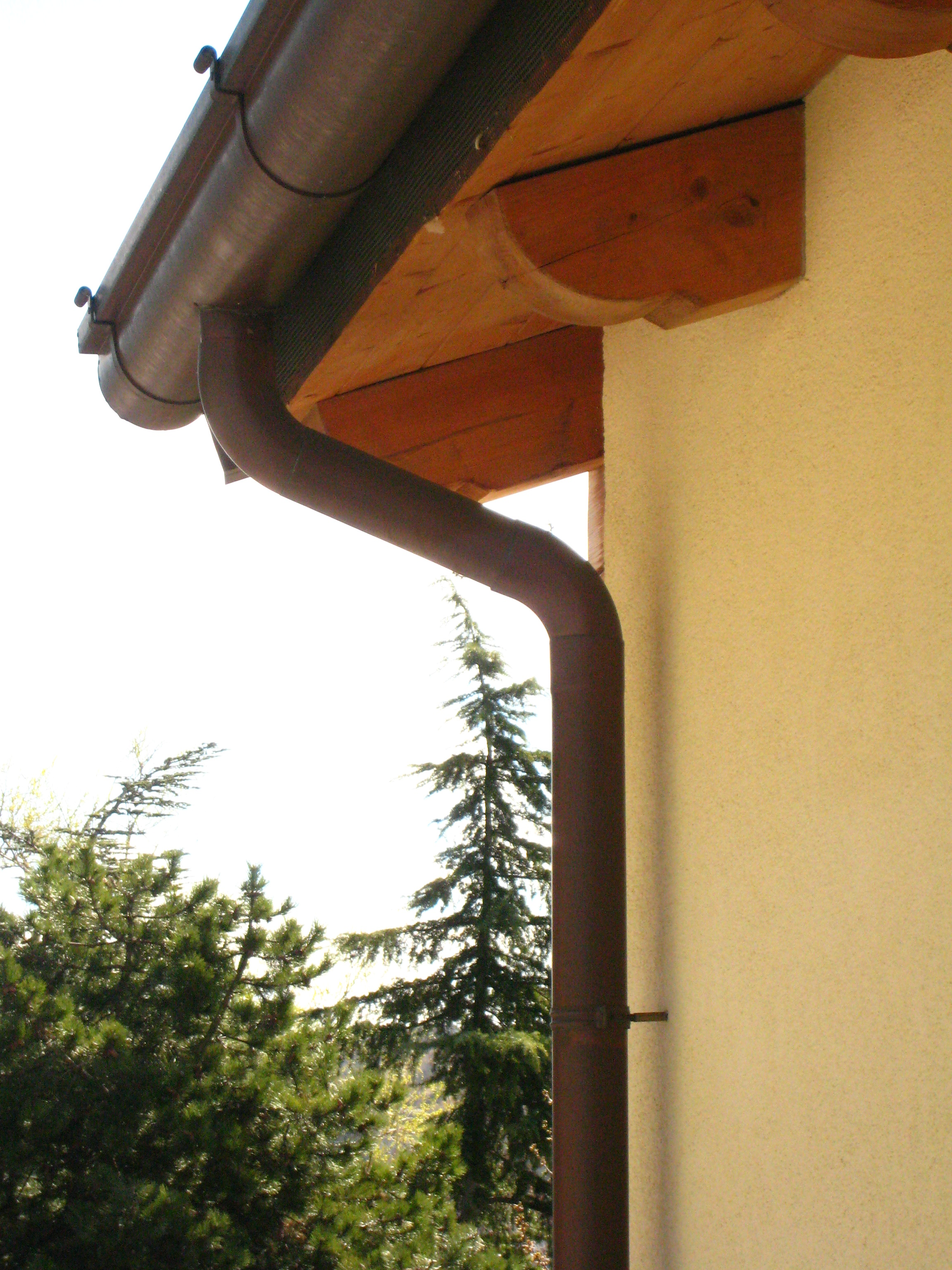 Tubo pluviale. Marzo 2008